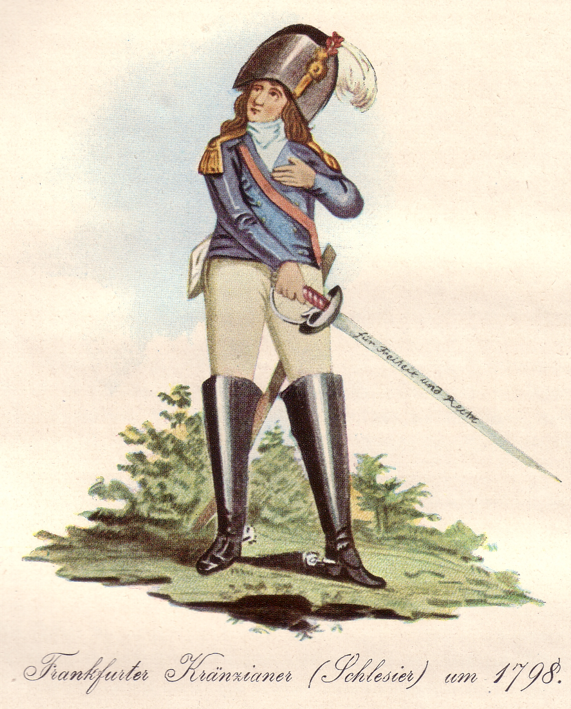 Frankfurter (Frankfurt/Oder) Kränzianer (Schlesier) um 1798